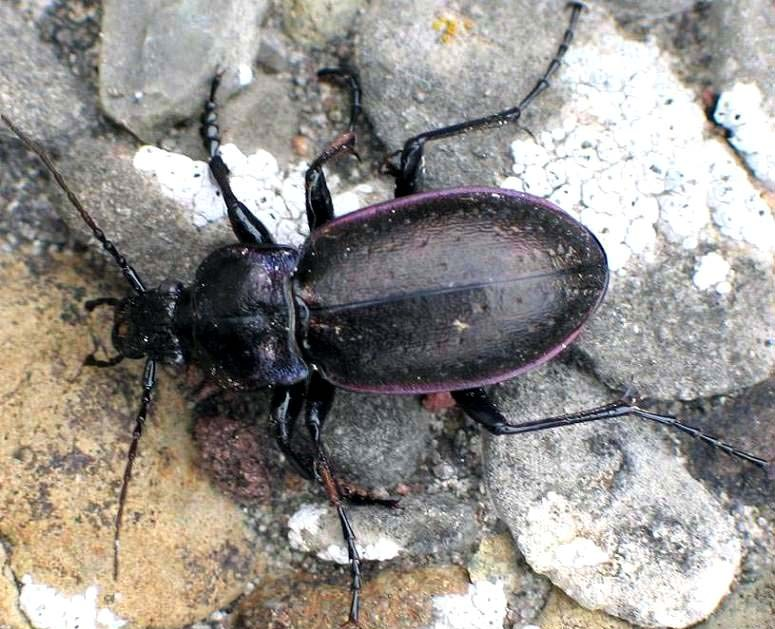 Hainlaufkäfer (Carabus nemoralis) – Der Käfer wurde von meiner Mutter im Keller gefangen und nach einer kleinen Fotoserie im Garten meiner Eltern in Eckernförde wieder in die Freiheit entlassen.